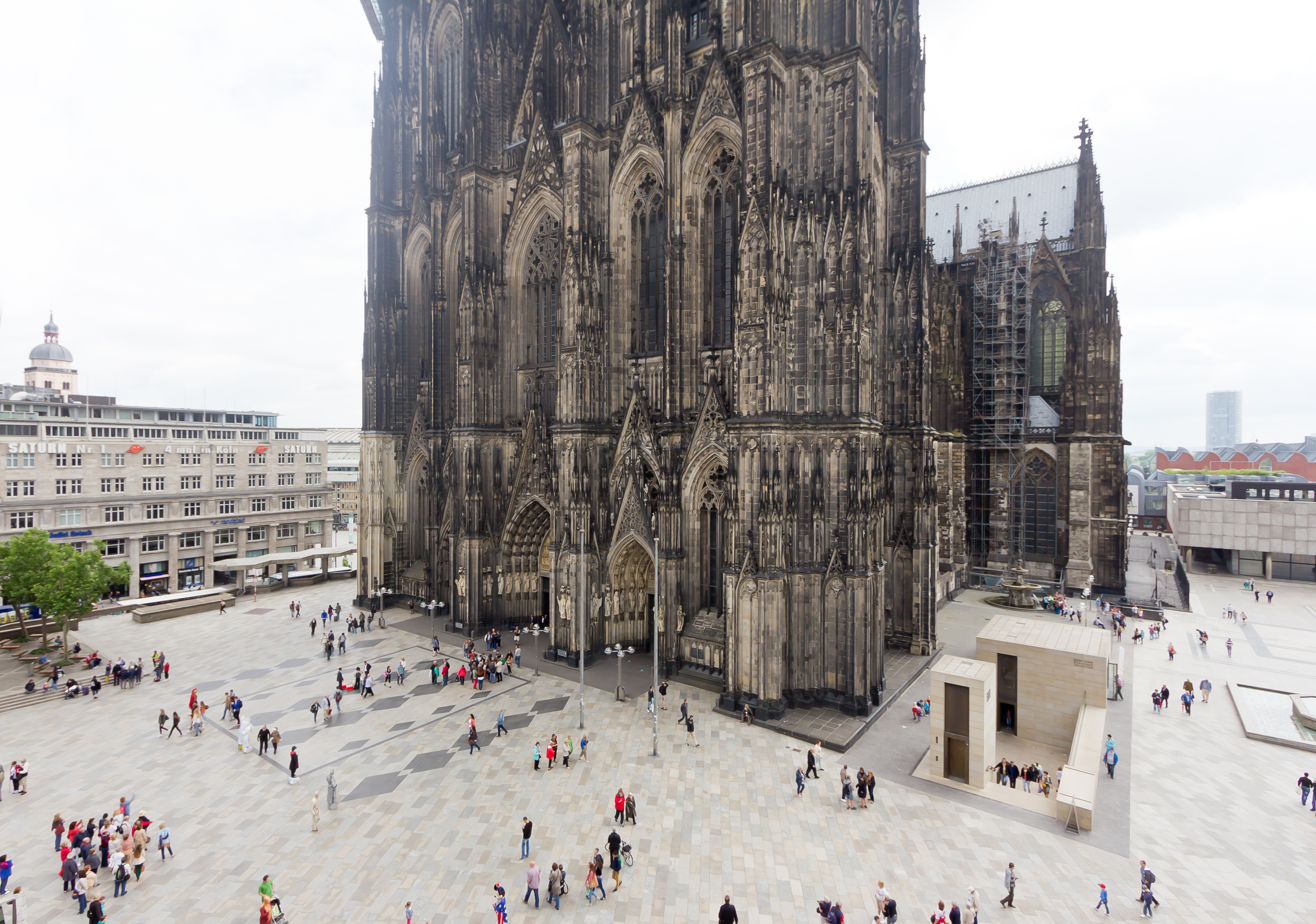 Kölner Dom Westseite und DomplatteThis is a photograph of an architectural monument.